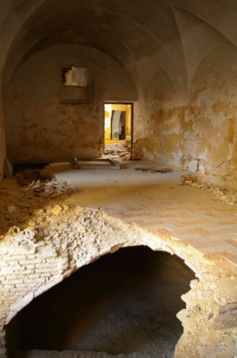 Almacén y sótano de la Casa de Arizón en Sanlúcar de Barrameda